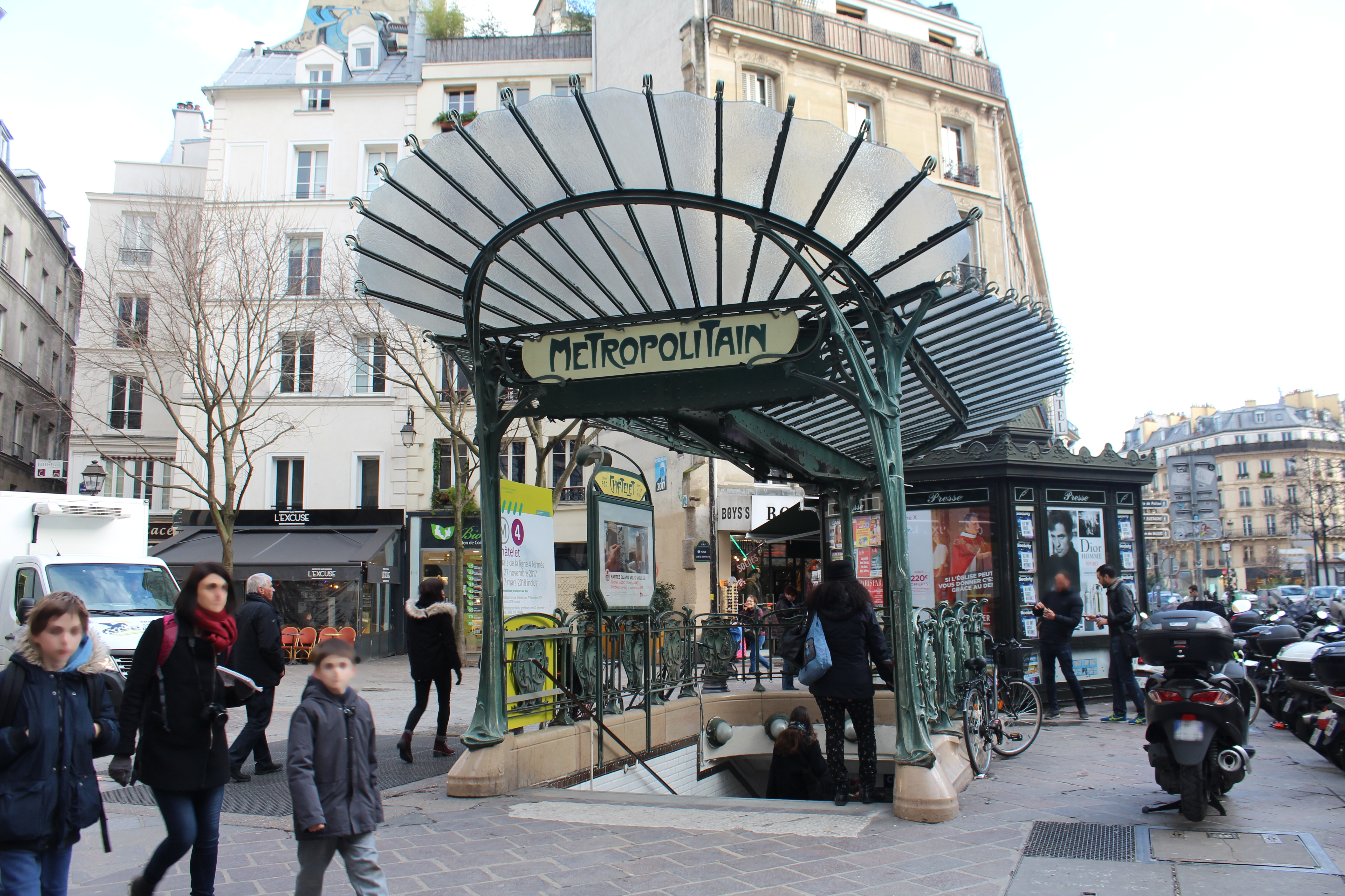 Entrée dans la station de métro Châtelet sur la place Sainte-Opportune, Paris.